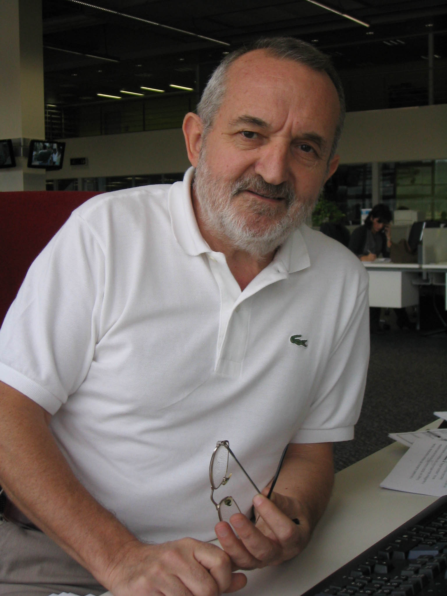 Escritor dsramaturgo David Barbero